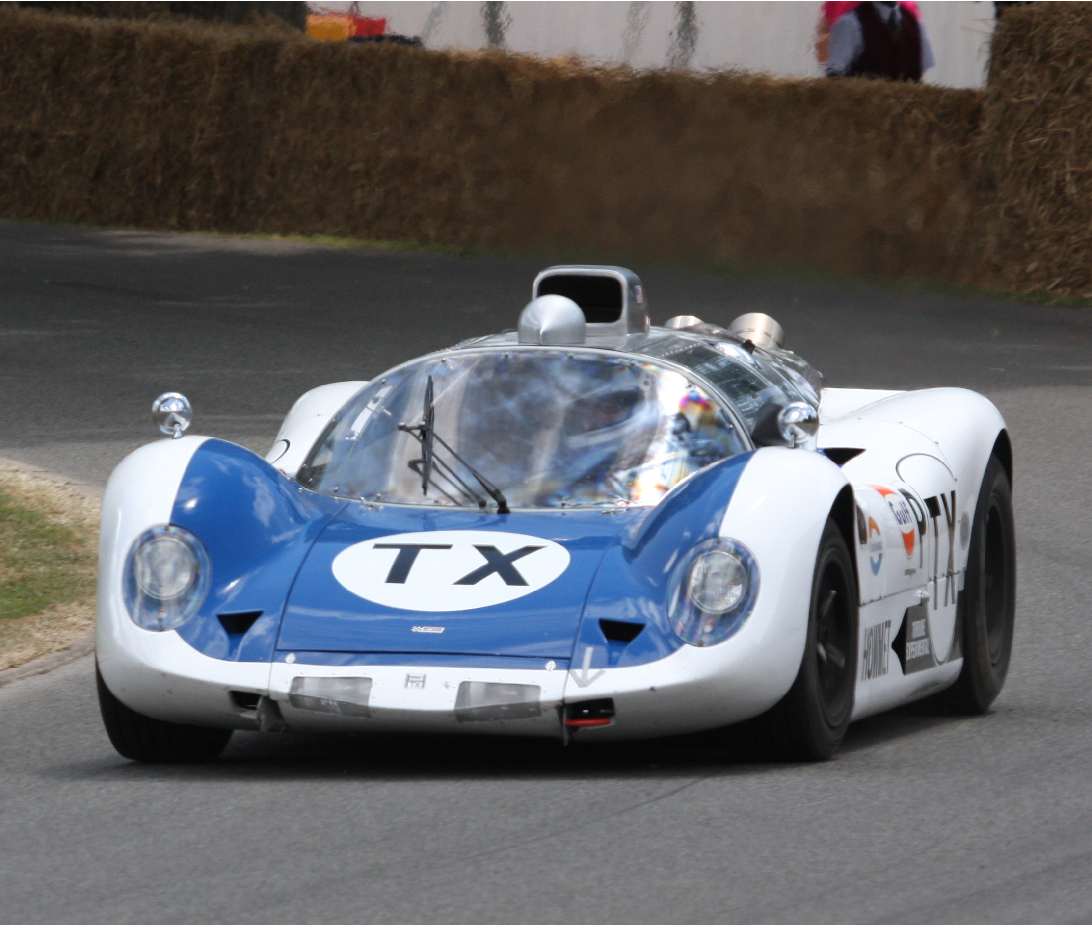 1968 Howmet TX Helicopter gas turbine engine